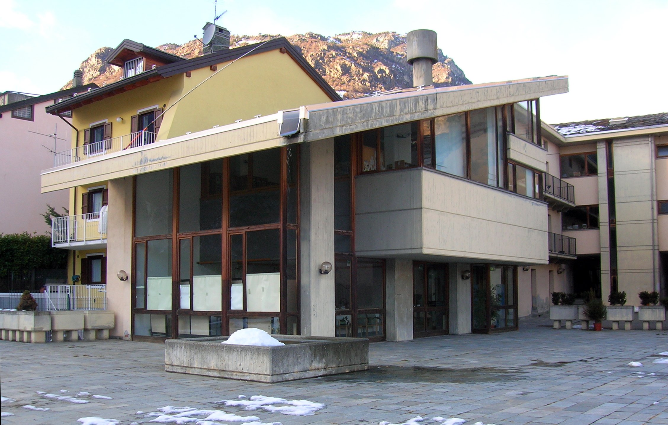 Biblioteca comunale di Châtillon vista dal piazzale del belvedere. Châtillon, Valle d'Aosta, Italia.